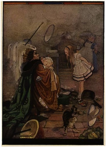 Гуинедд Хадсон. Иллюстрация к Алисе в Стране чудес